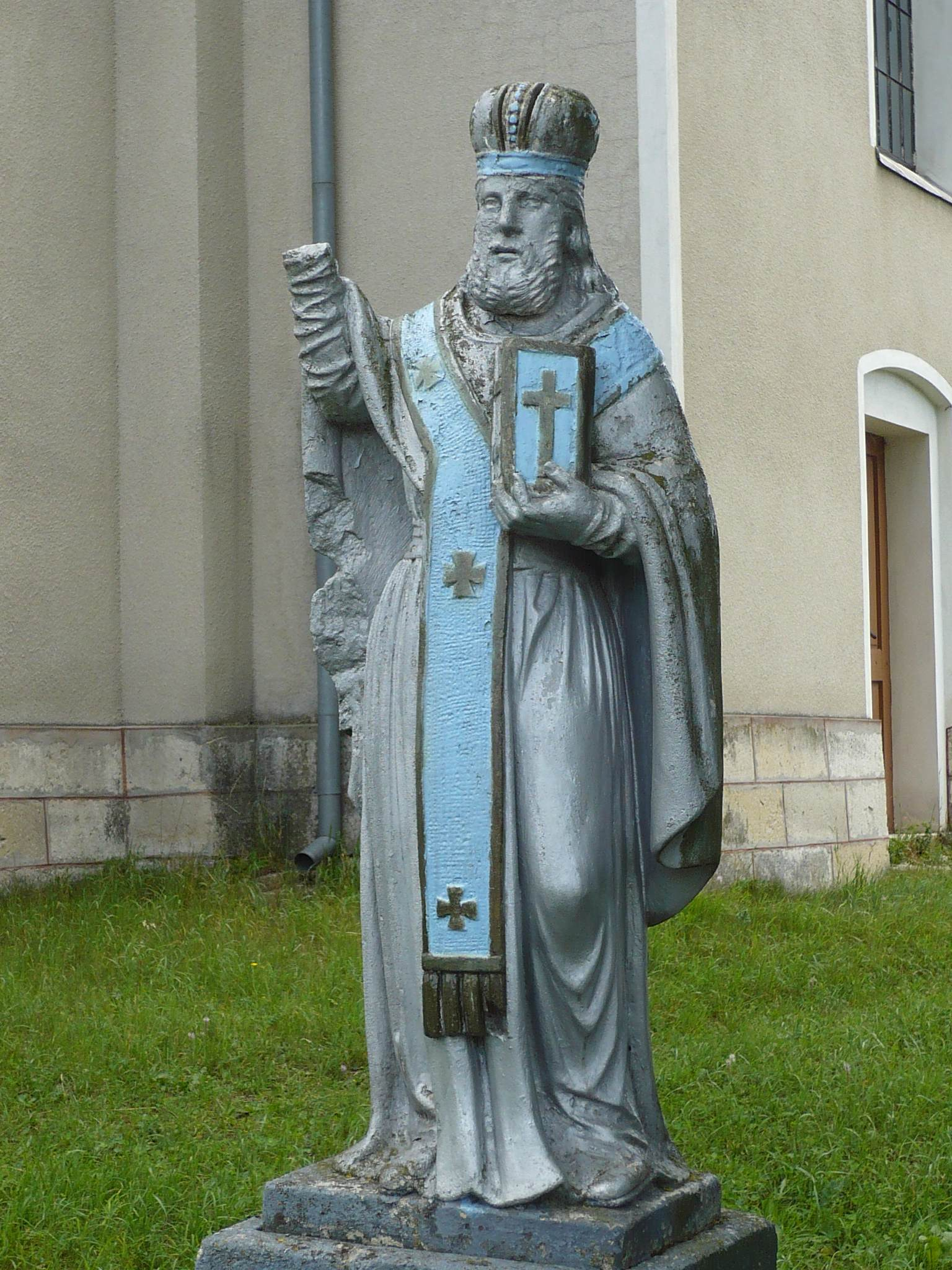 Czeremosznia, figura św.